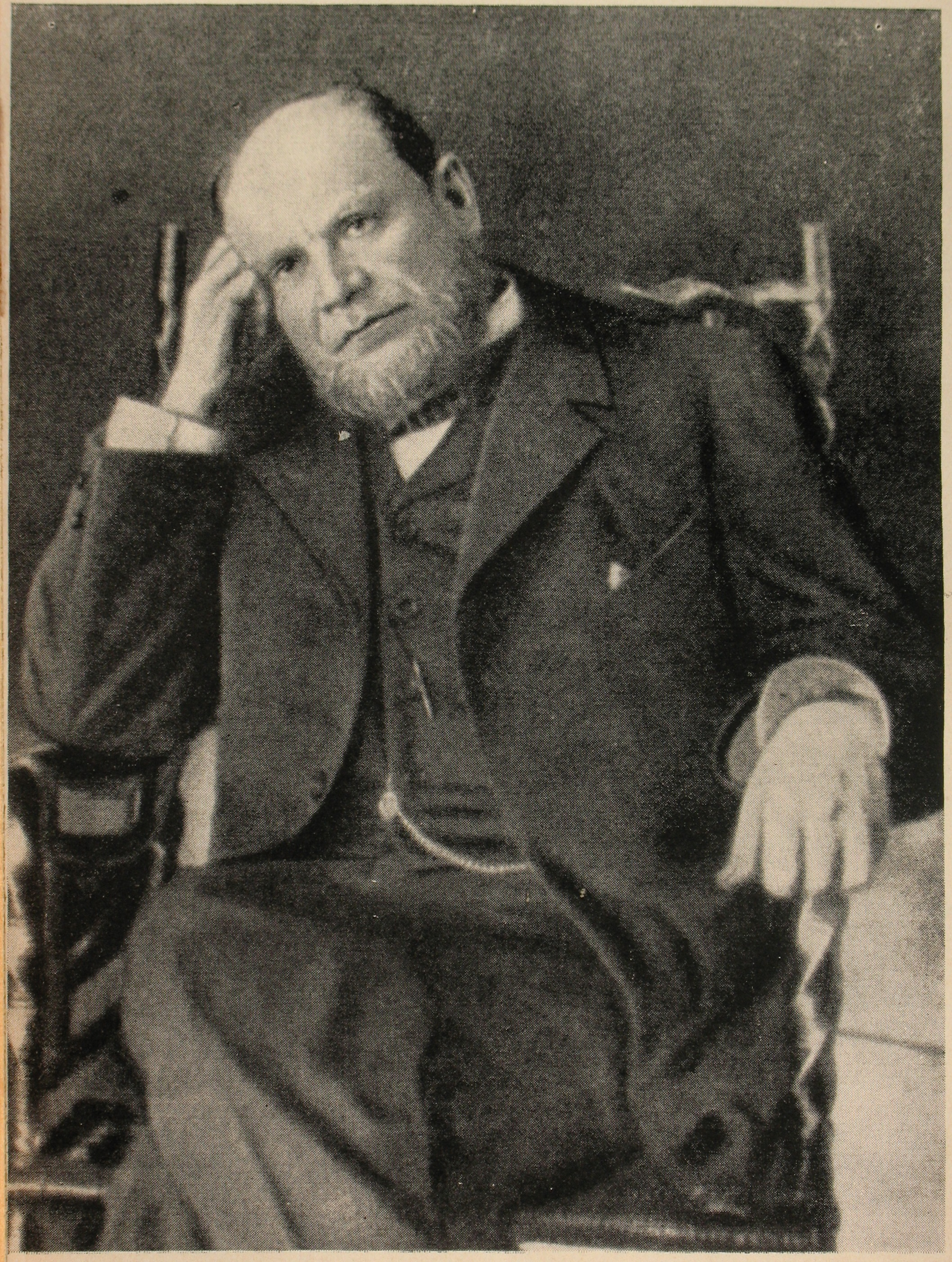 Кони, Анатолий Фёдорович — русский юрист и общественный деятель, член Государственного совета